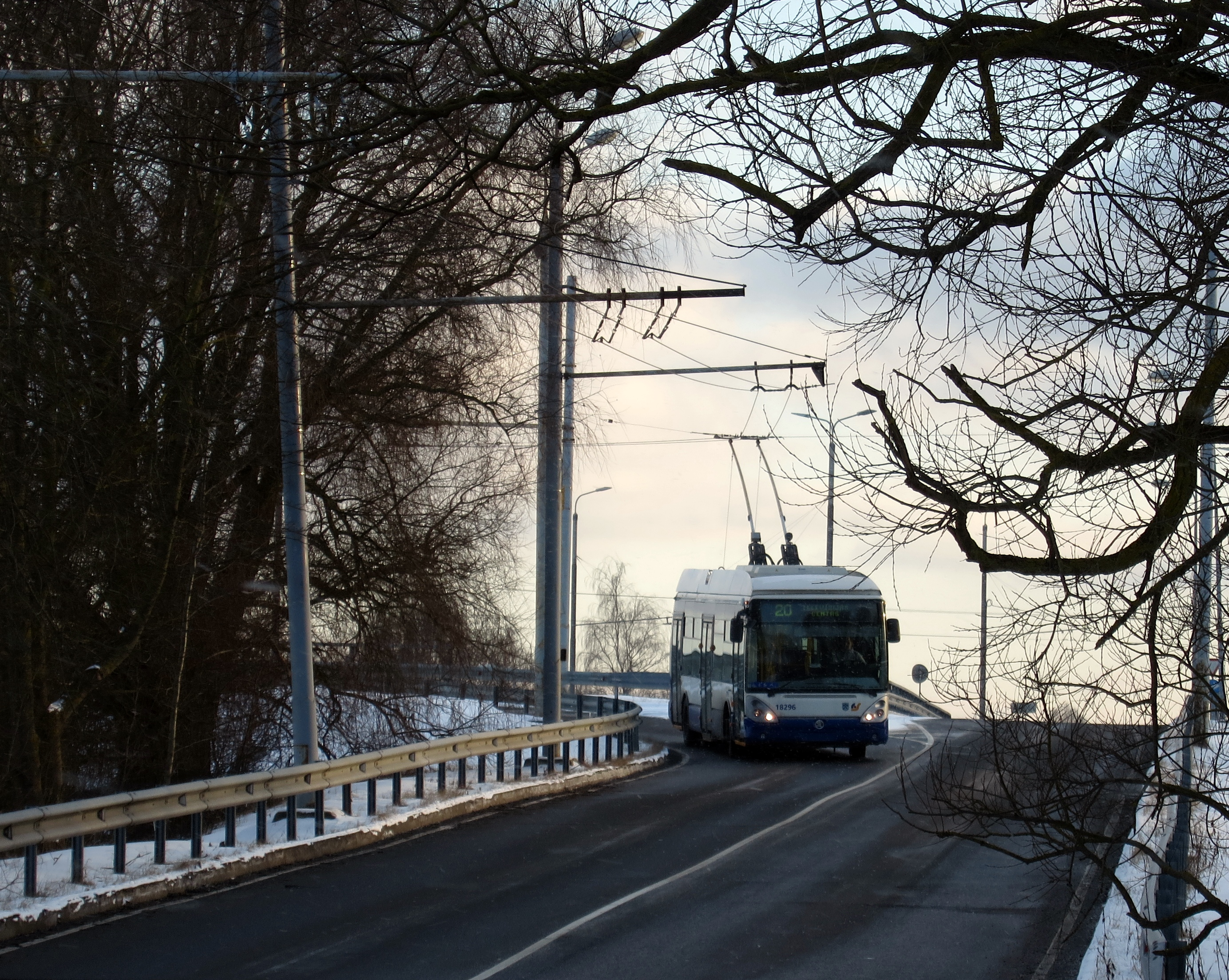 20. maršruta trolejbuss uz nobrauktuves no Salu tilta